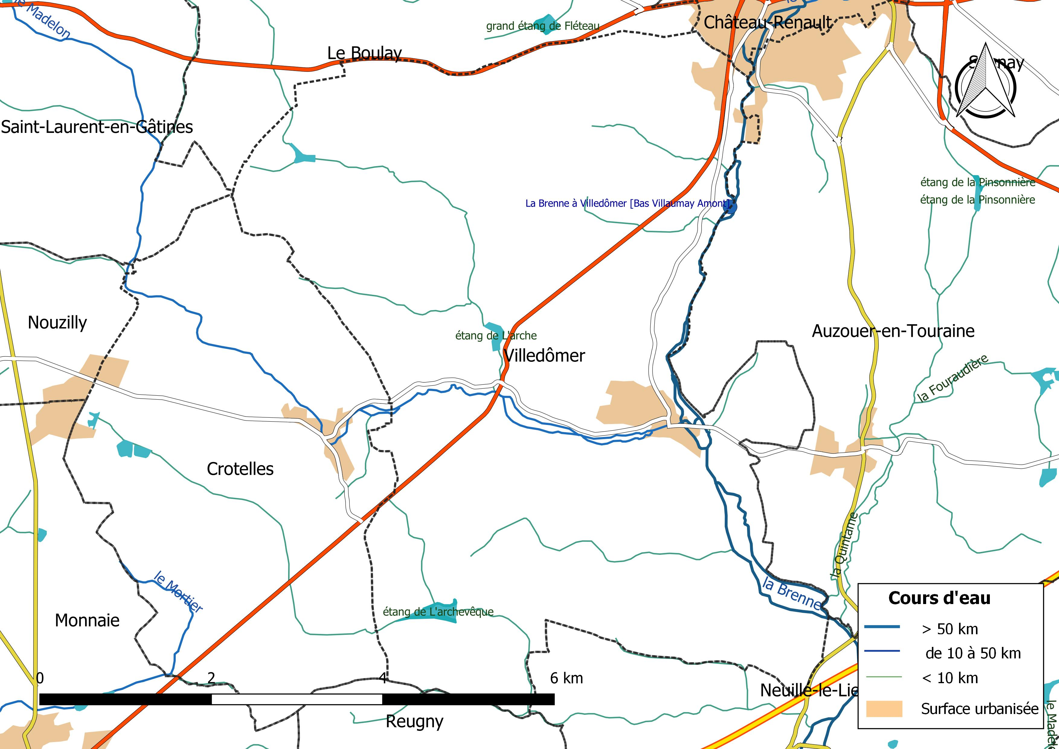 Carte du réseau hydrographique de la commune de Villedômer (France).